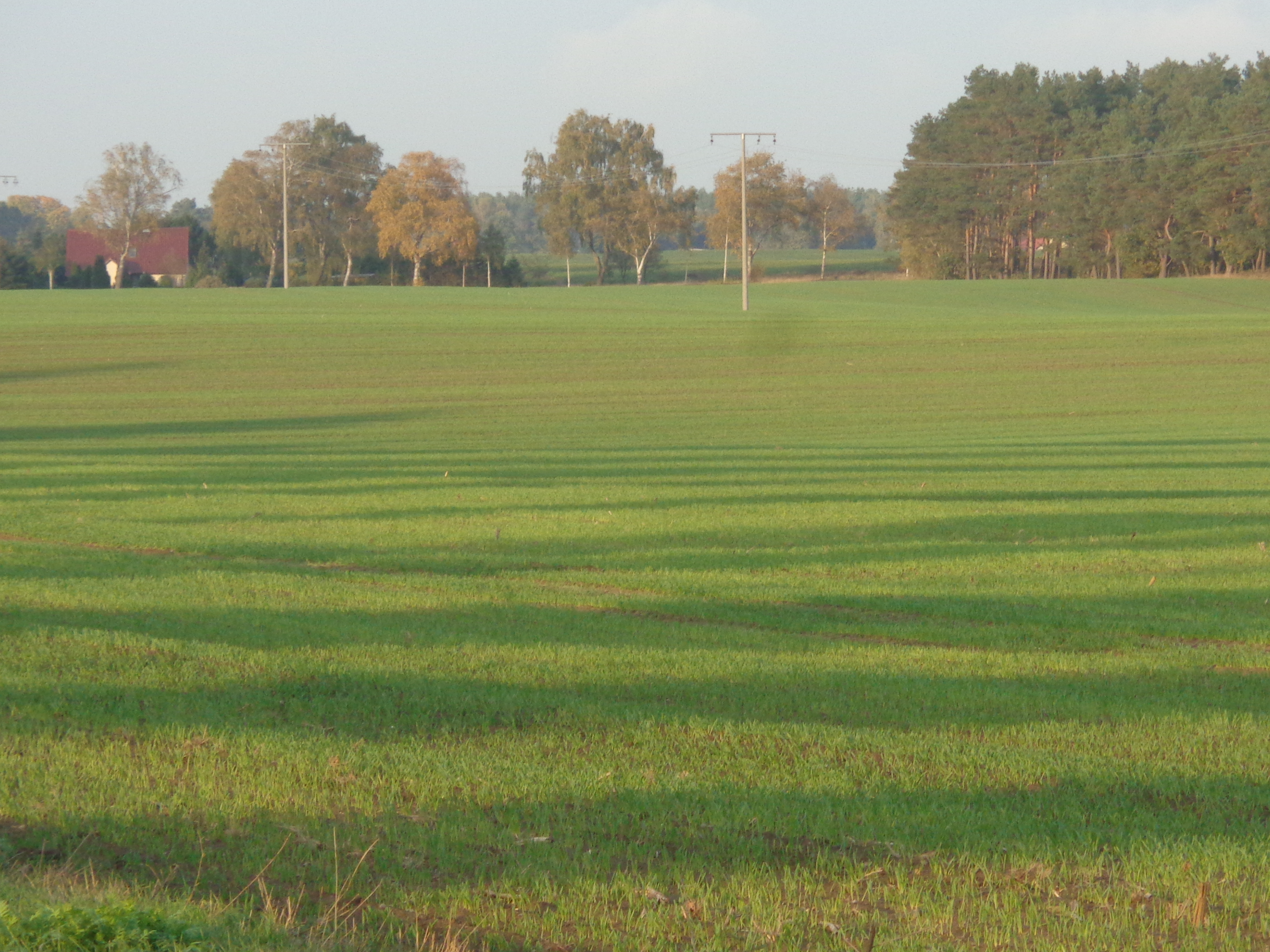 Aufgelaufene Wintersaat in Plau am See